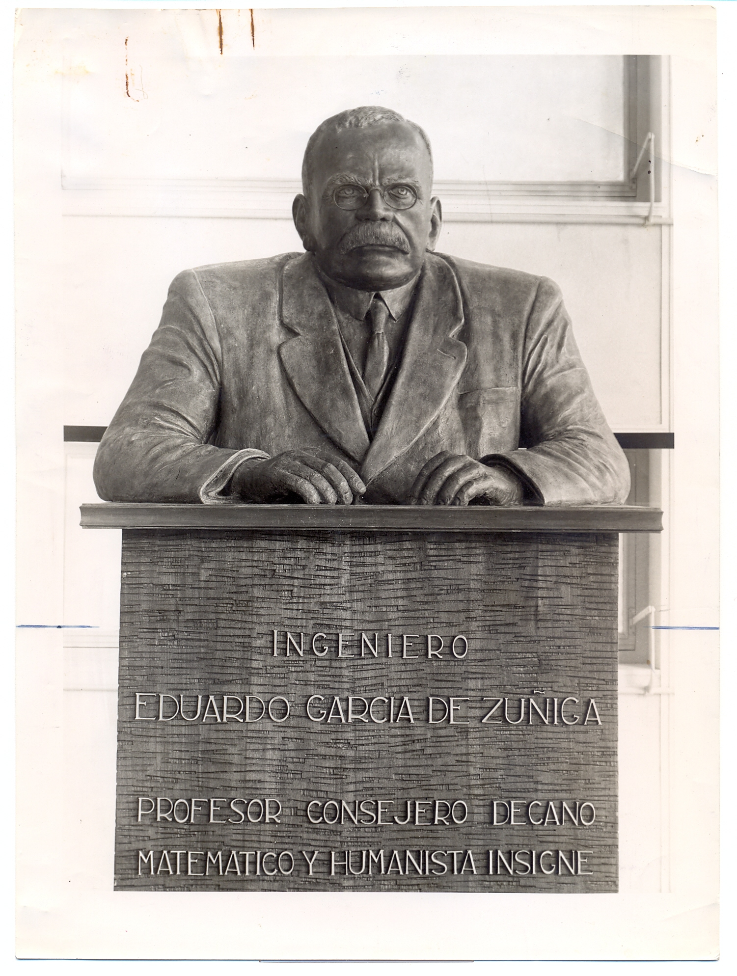 Busto ubicado a la entrada de la Biblioteca de Facultad de Ingeniería descubierto el 14 de mayo de 1953. En el 2013 se cumplieron sesenta años de su inauguración.